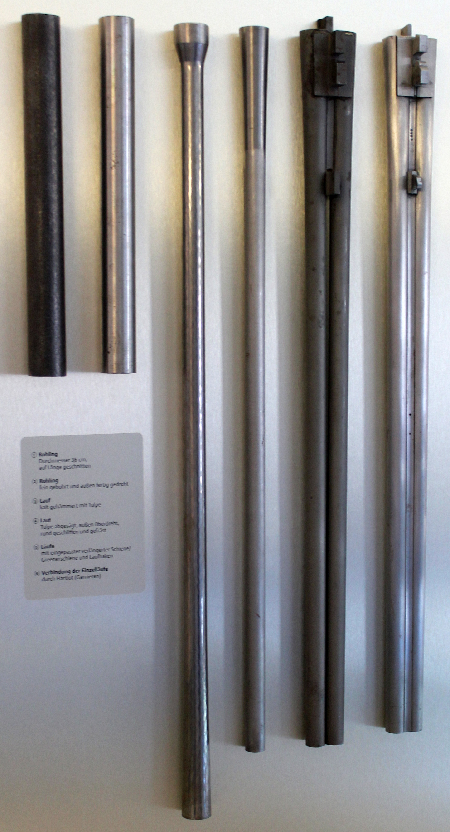 Herstellung von Gewehrläufen am Beispiel einer Doppelflinte. Waffenmuseum Suhl.